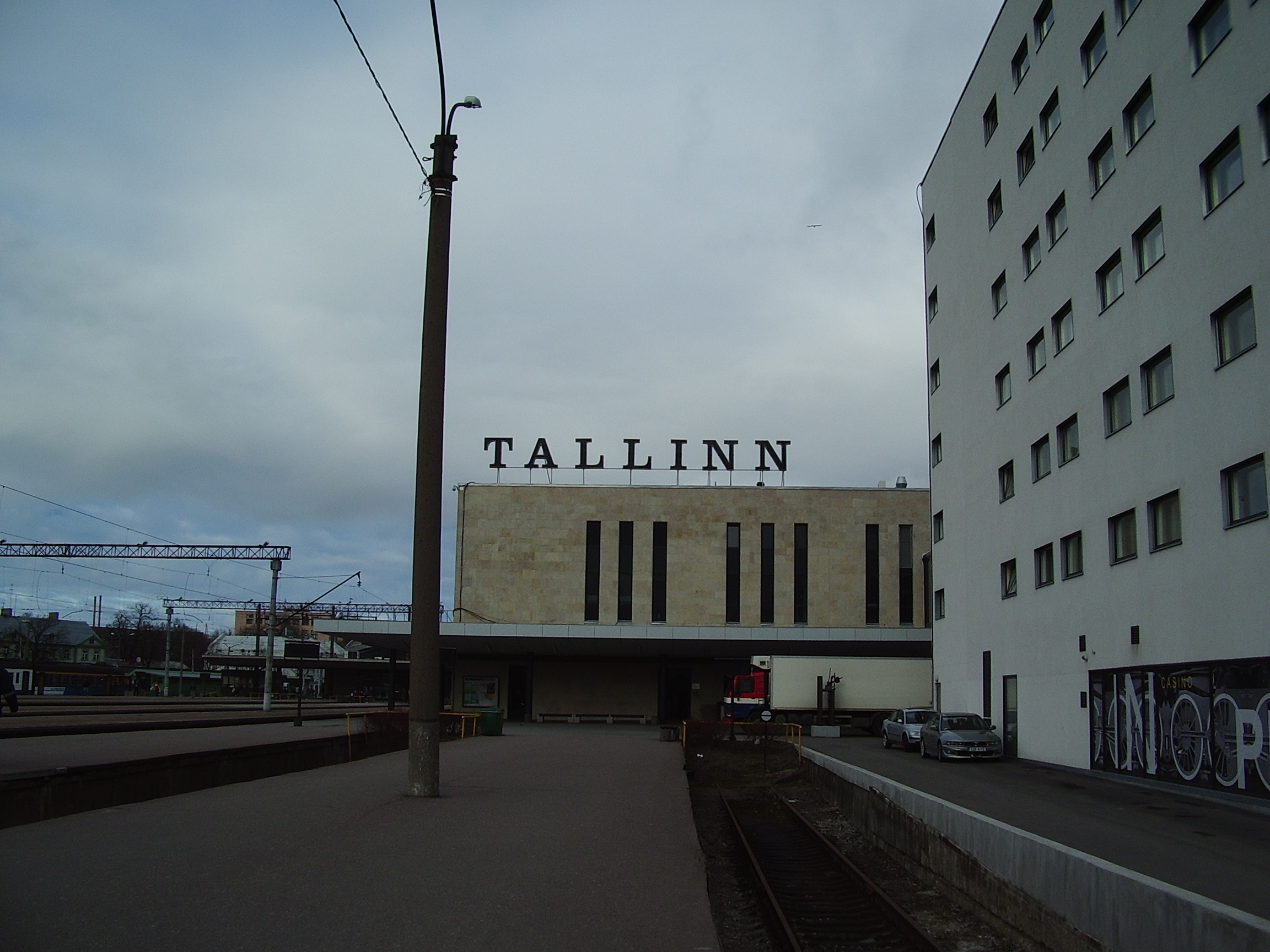 Baltischer Bahnhof (Bahnhof Reval)